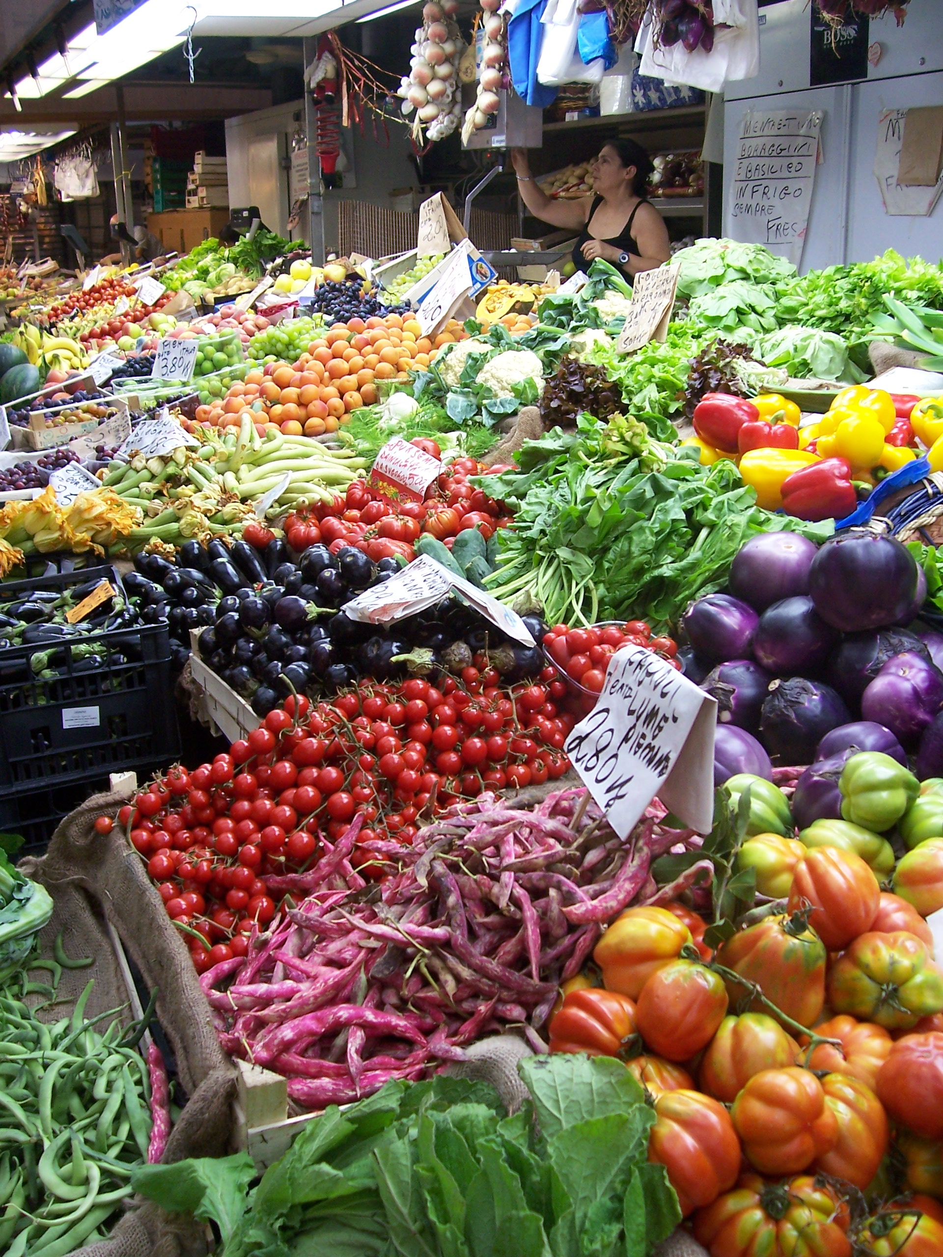 Etal dans un marché couvert à Gênes